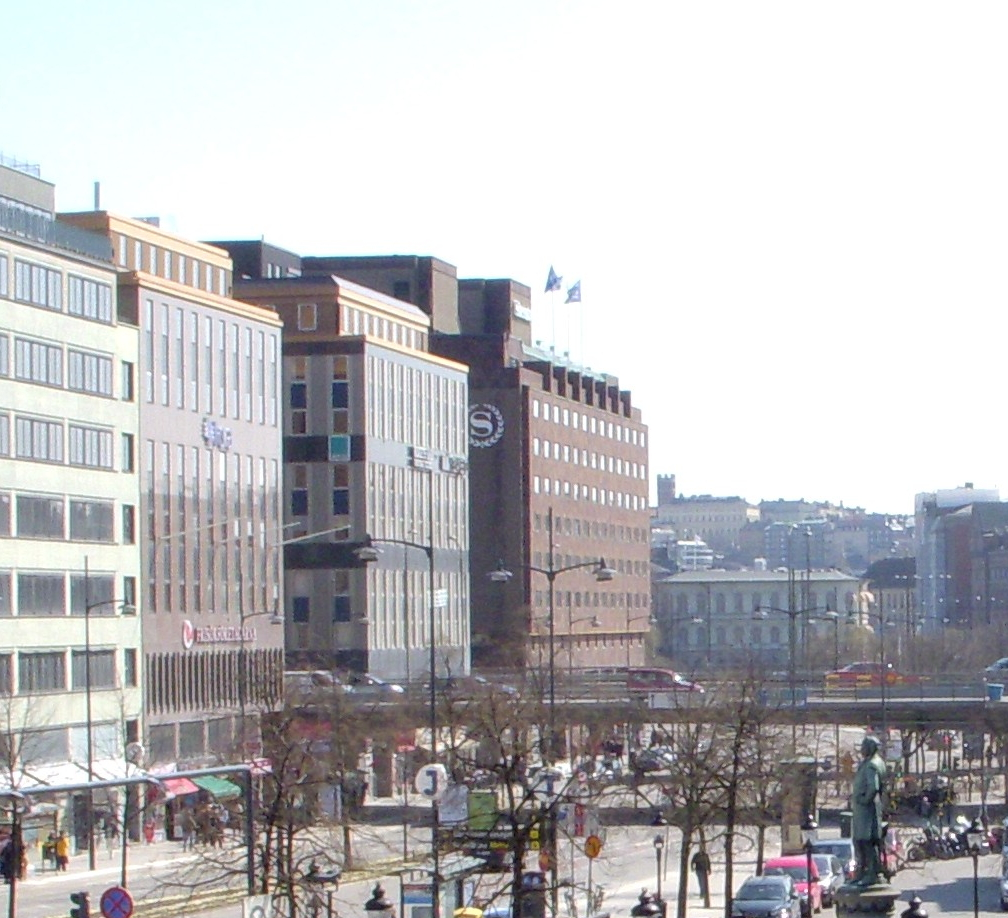 Södra delen av Vasagatan i Stockholm, inklusive Esseltehuset t.v., Vasagatan 10 (bl.a. med SPP) och Hotel Sheraton.